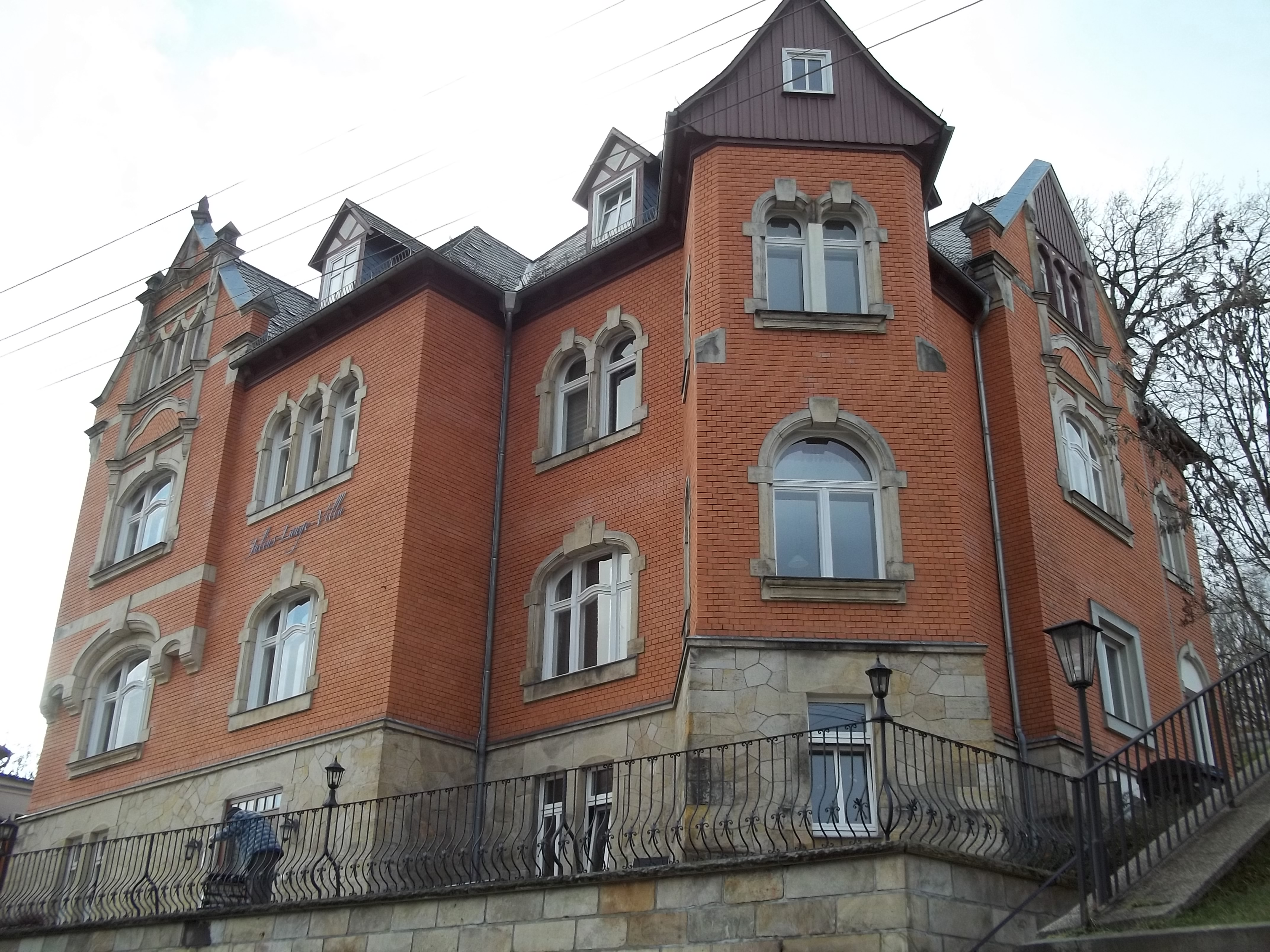 Die Julius-Lange-Villa in Waltersdorf im Zittauer Gebirge. Die Villa dient seit 2014 als Seniorenheim. Zu DDR-Zeit war sie Ferienheim, auch war dort die Gaststätte "Zur Lausche" beheimatet.